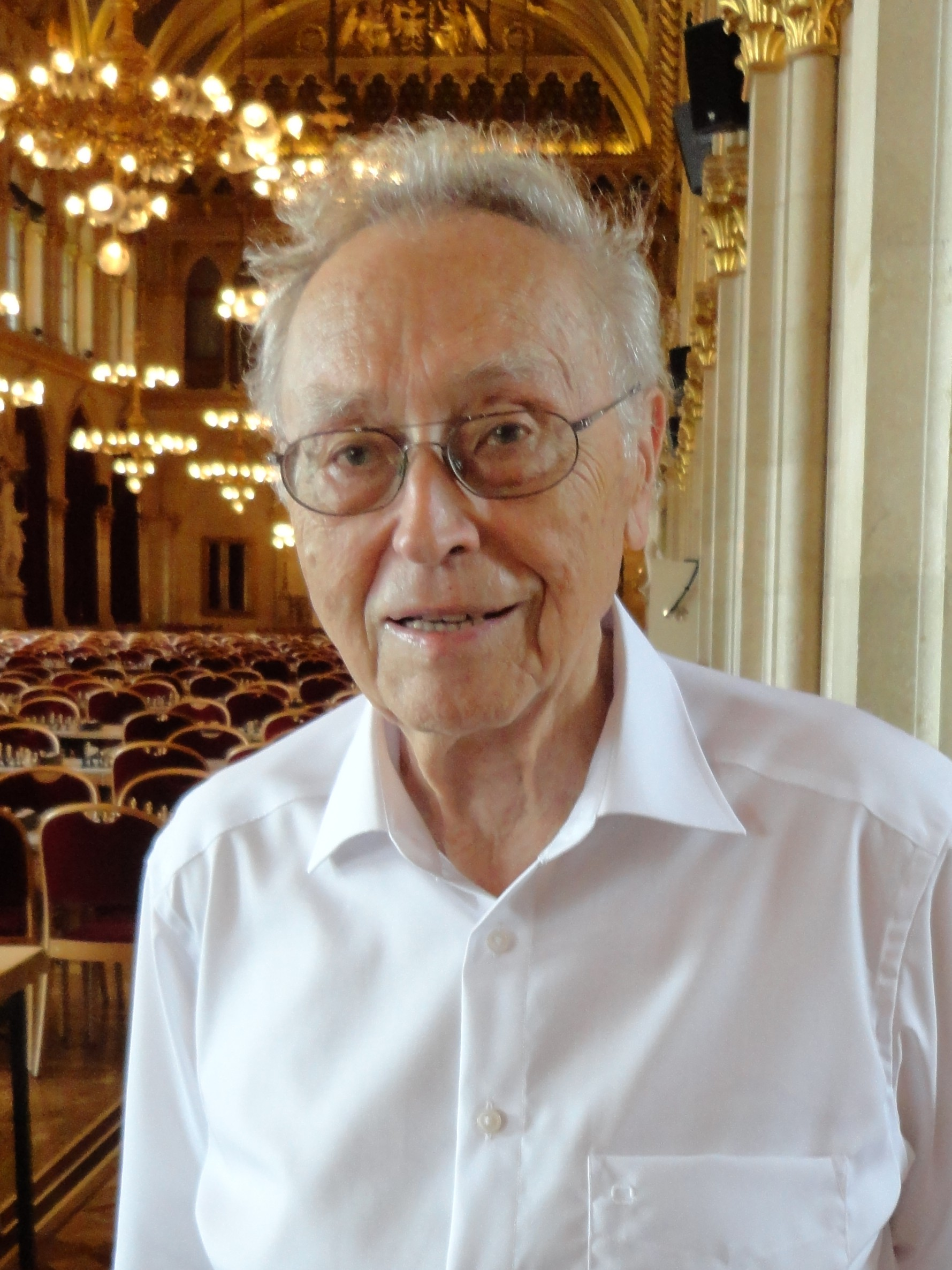 Kurt Jungwirth, Vienna Chess Open 2015 in Wien